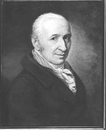 Portrait von Paul Wolfgang Merkel (1756-1820)